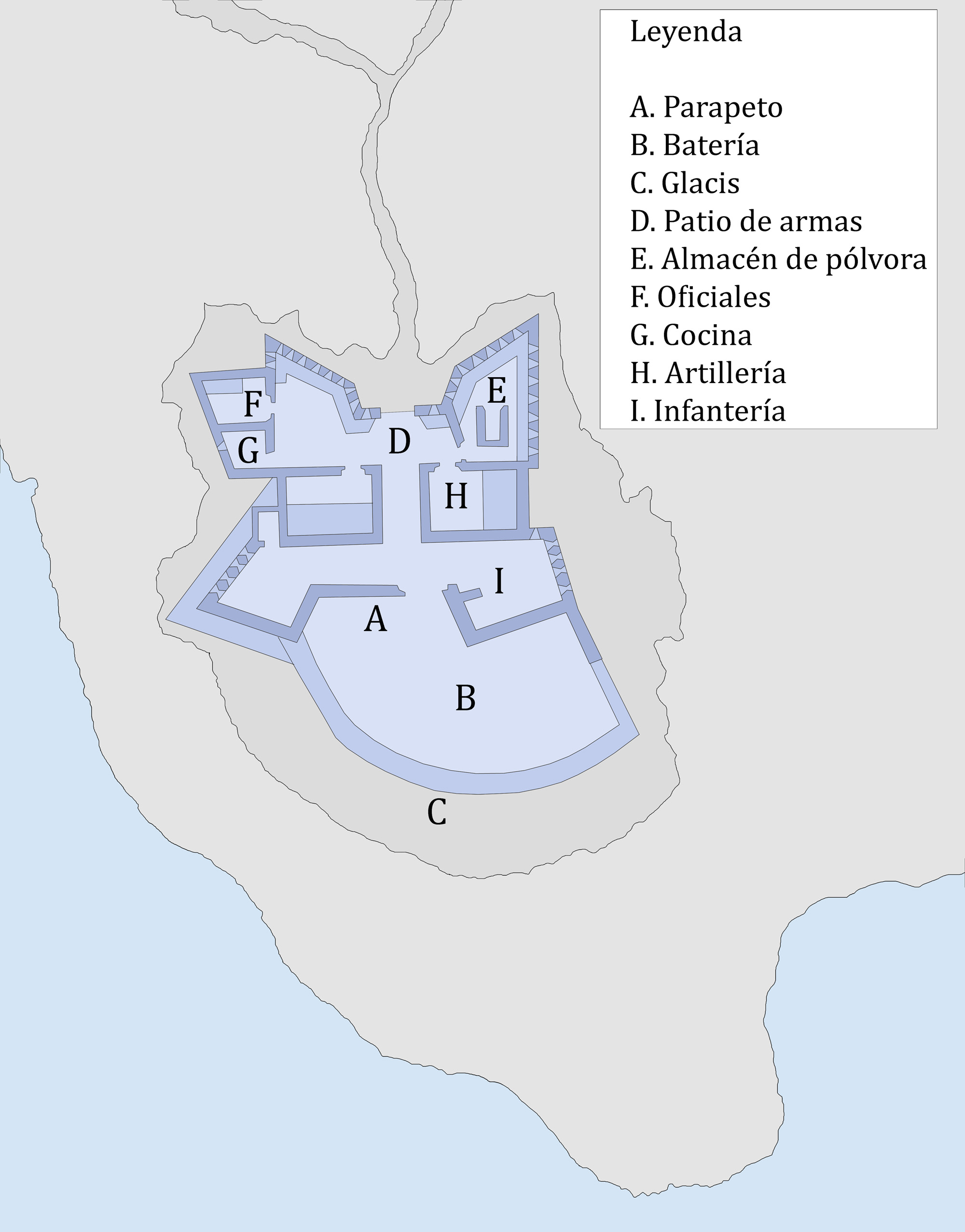 Plano del fuerte de Punta Carnero